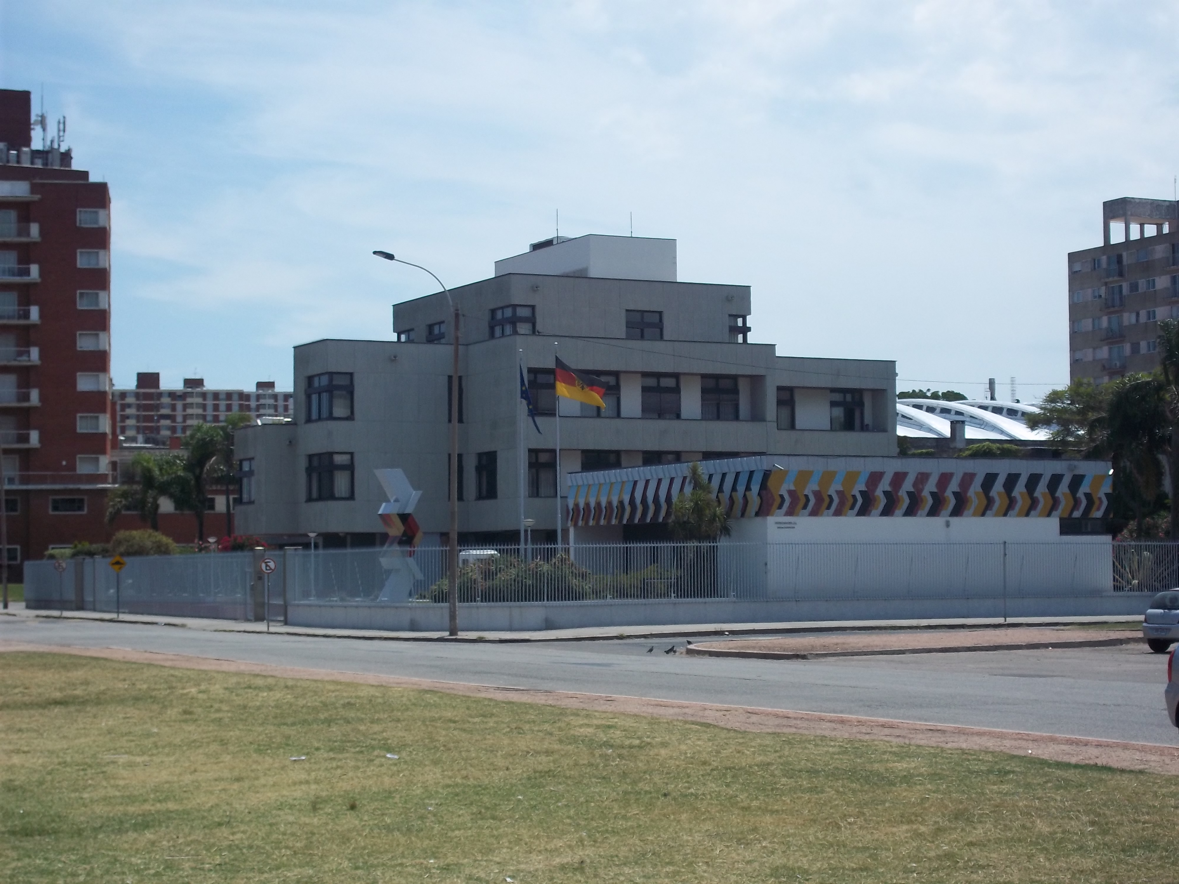 Edificio de la Embajada de Alemania en Uruguay. Rambla República Argentina, Montevideo. Embassy of Germany in Uruguay.